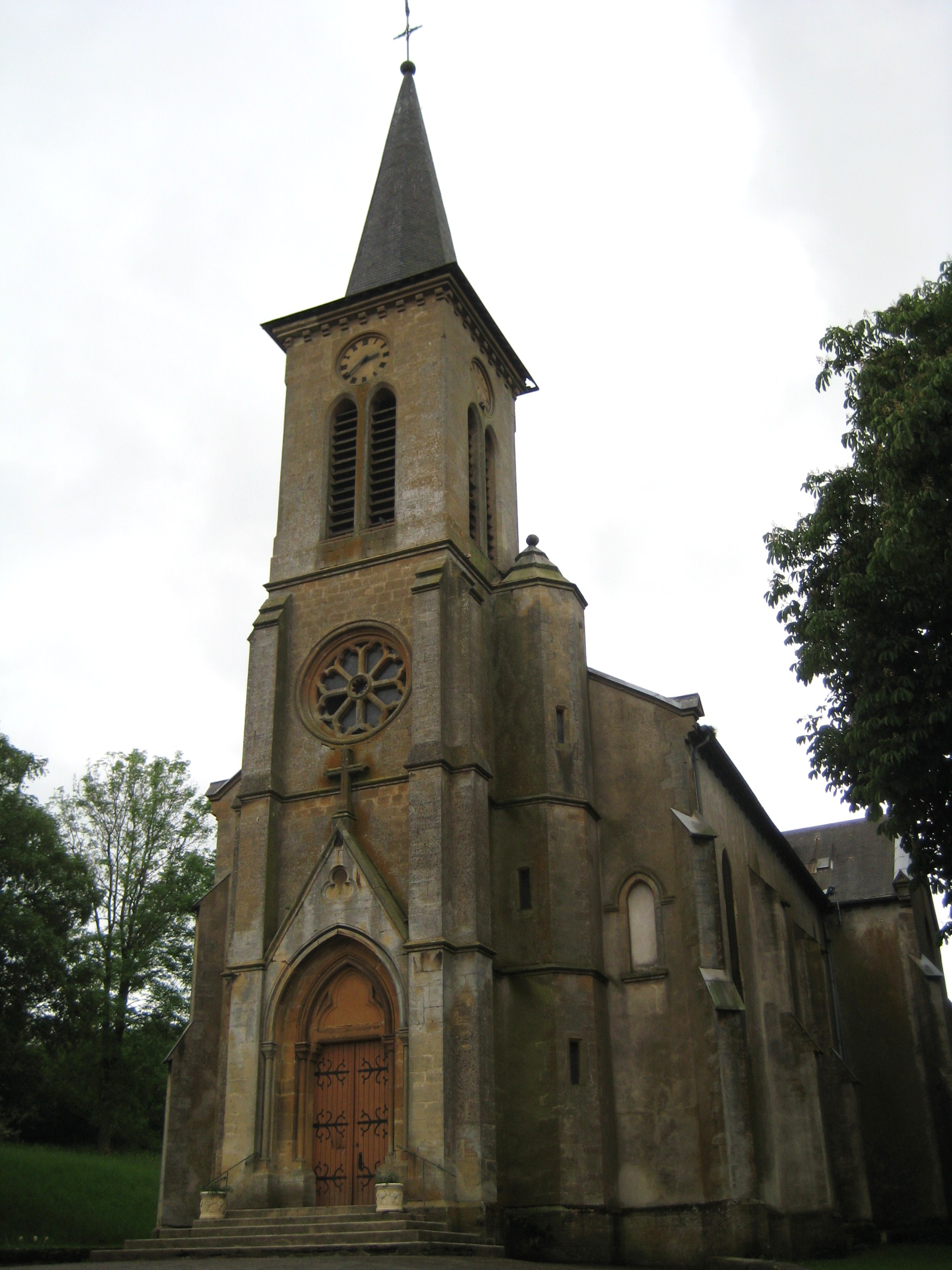 Description Église de SancyDate 16 May 2009Source mon appareil photoAuthor Aimelaime Église de Sancy